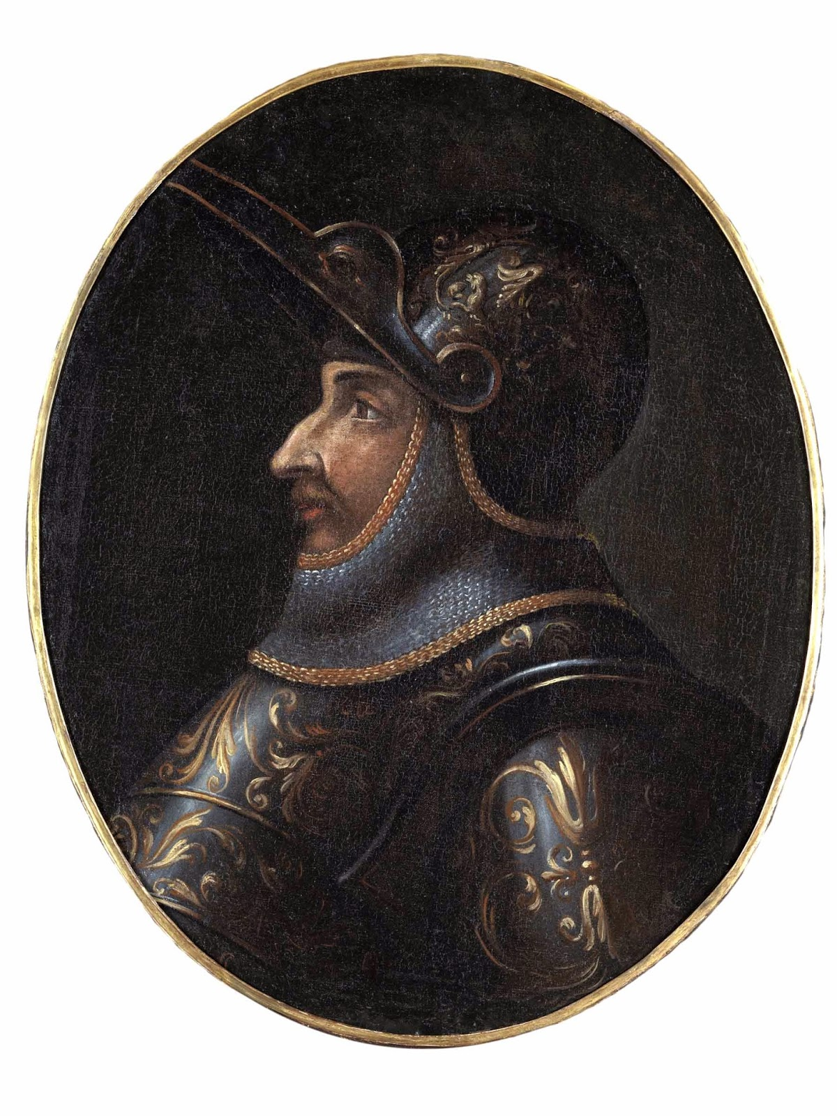 Dipinto di Ludovico I Gonzaga